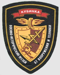 Шеврон танкового музея Кубинка